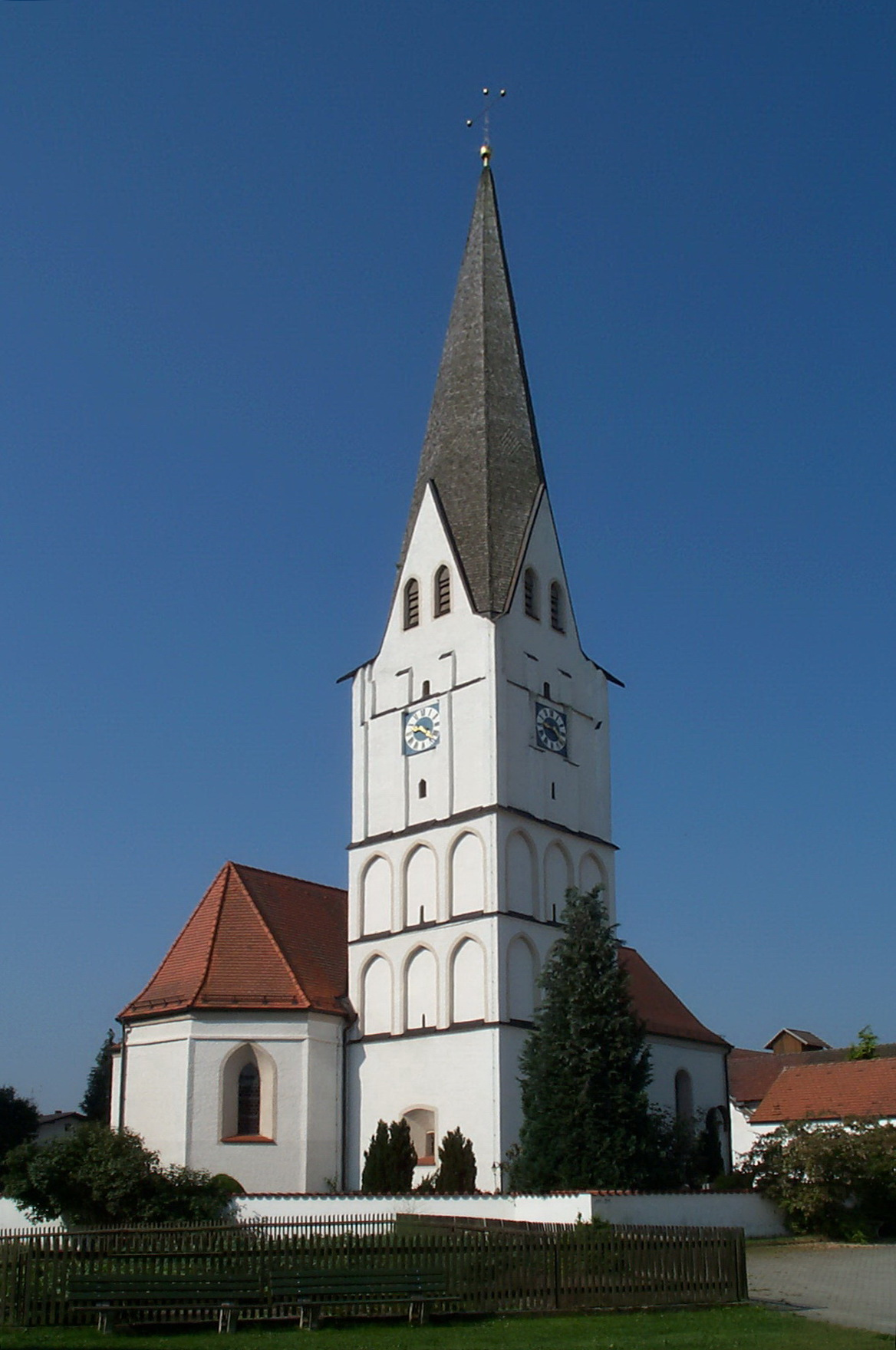 Rottenburg an der Laaber. Inkofen, Haus Nr. 117. Katholische Pfarrkirche Mariä Reinigung mit Kapelle. Saalkirche aus der zweiten Hälfte 15. Jahrhunderts. Barocker Ausbau in der Mitte des 17. Jahrhunderts. Gliederung durch Dreiecklisenen und Dachfries am Chor. Der Turm erhebt sich in fünf ungleich hohen Geschossen, von denen die oberen vier reich mit Spitzbogenblenden belebt sind. Die obersten Blenden sind unvollständig erhalten. Hoher schindelgedeckter Spitzhelm über vier Steilgiebeln mit spitzbogigen Schallfenstern.